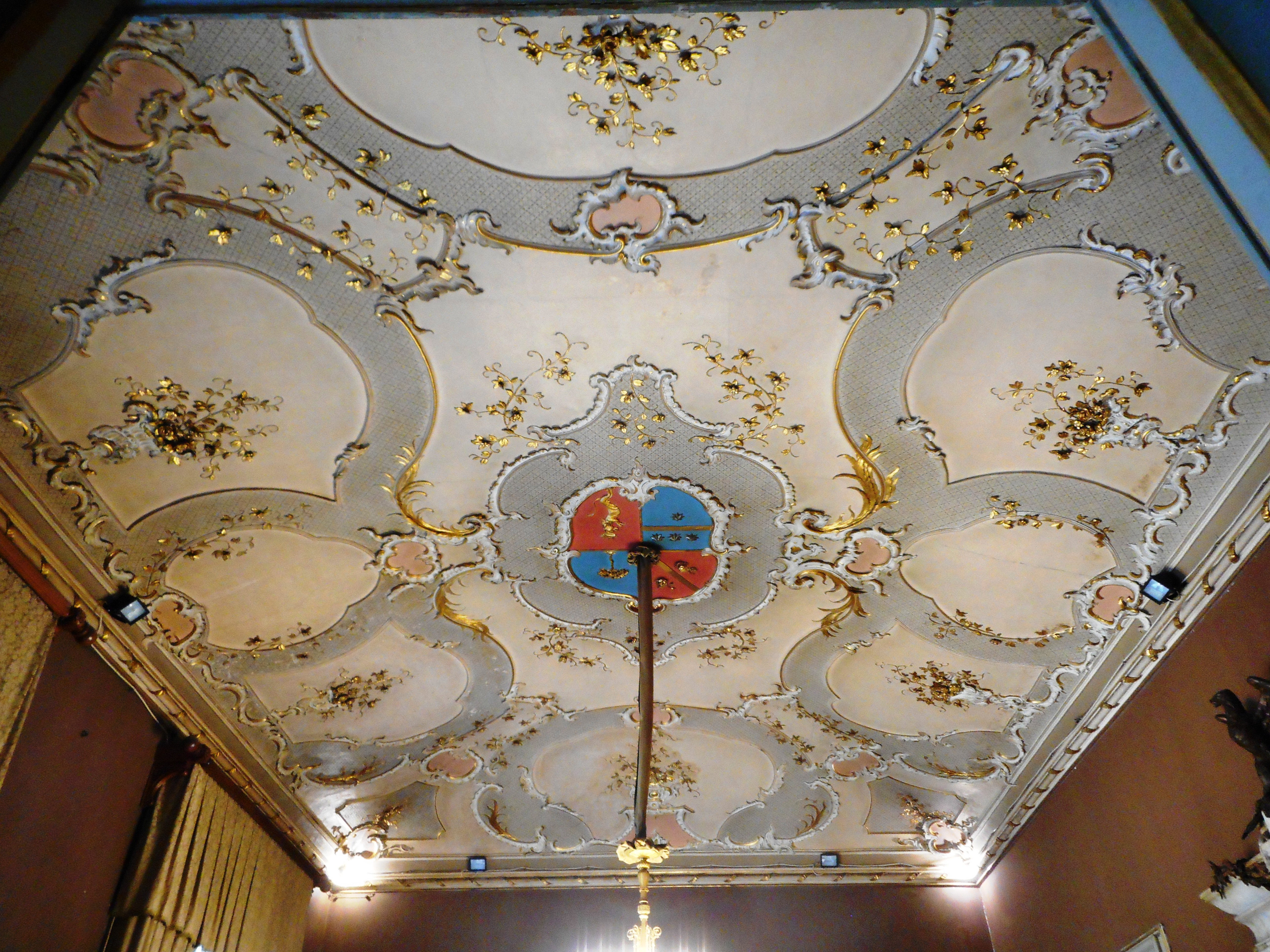 Palazzo Pretorio (Palermo) soffitto di uno dei saloni di rappresentanza This is a photo of a monument which is part of cultural heritage of Italy.